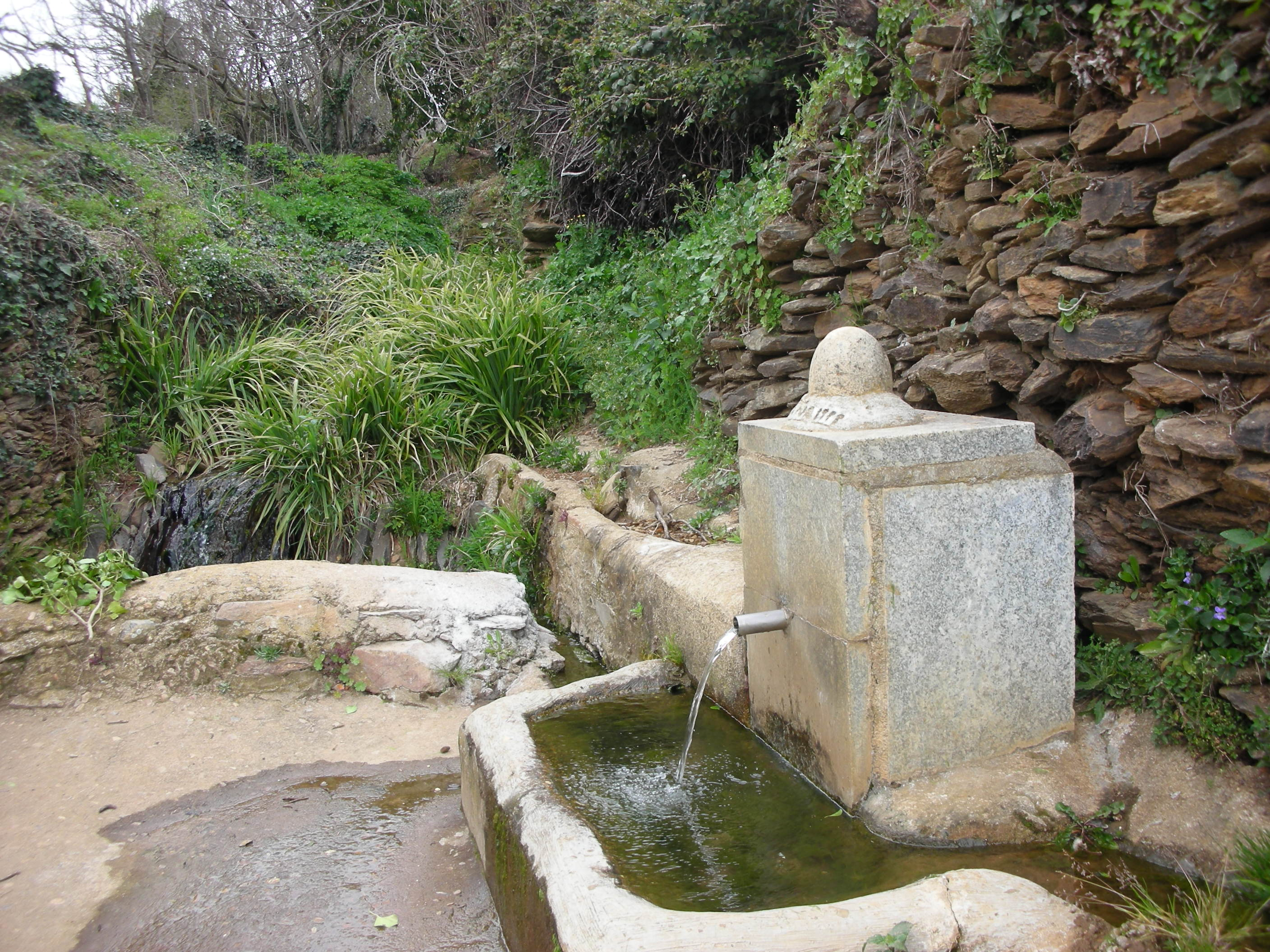 Fontaine de Maricabosa de la commune de Sotoserrano en Espagne